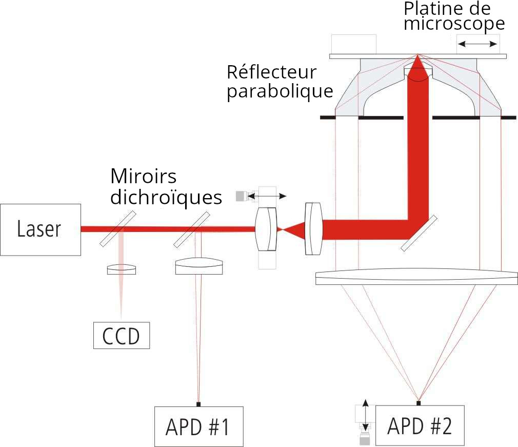 Traduction de l'image de User:Fluoro